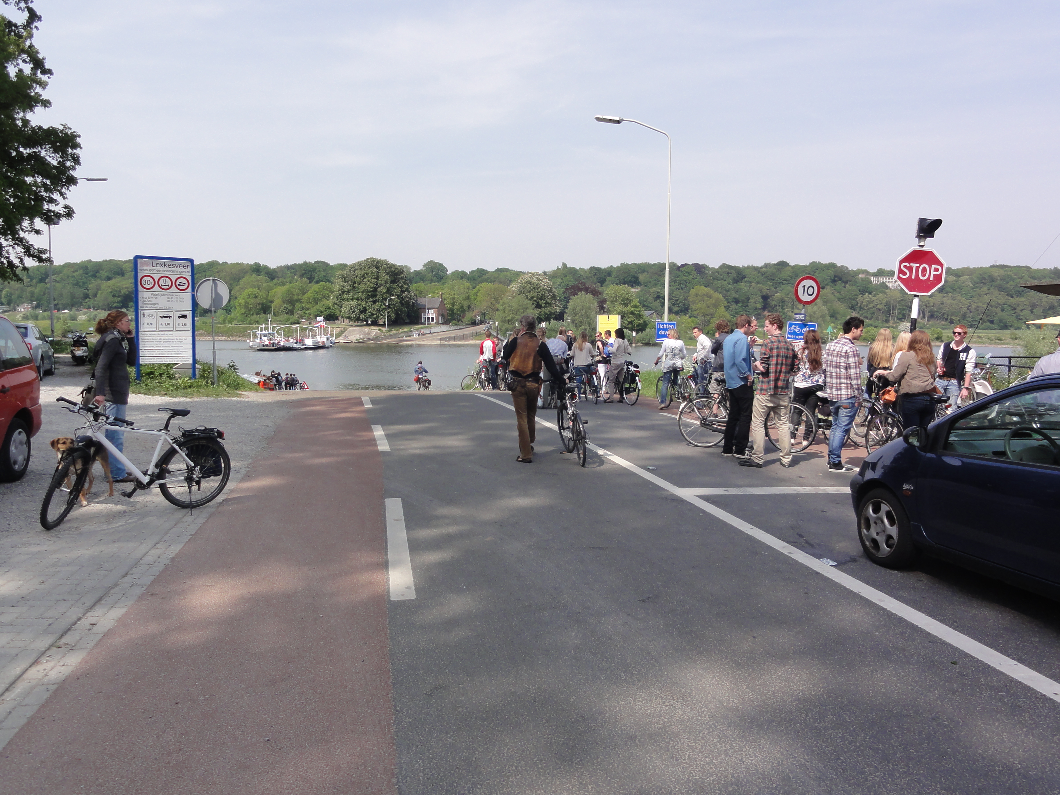 Randwijk (overbetuwe) wachten op Lexkesveer over de Rijn naar Wageningen